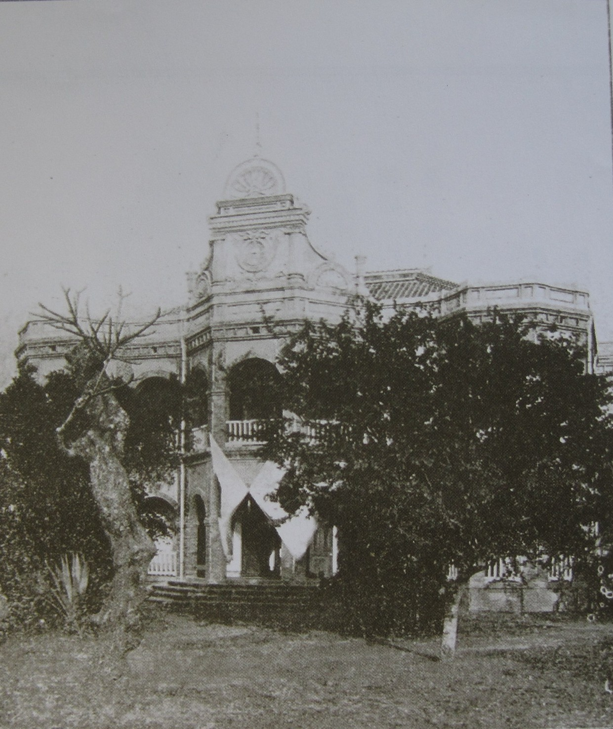 日治時期的原臺南縣知事官邸